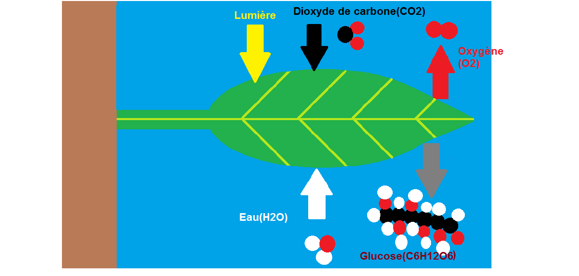 Shéma résumant la réaction de photosynthèse chez les plantes